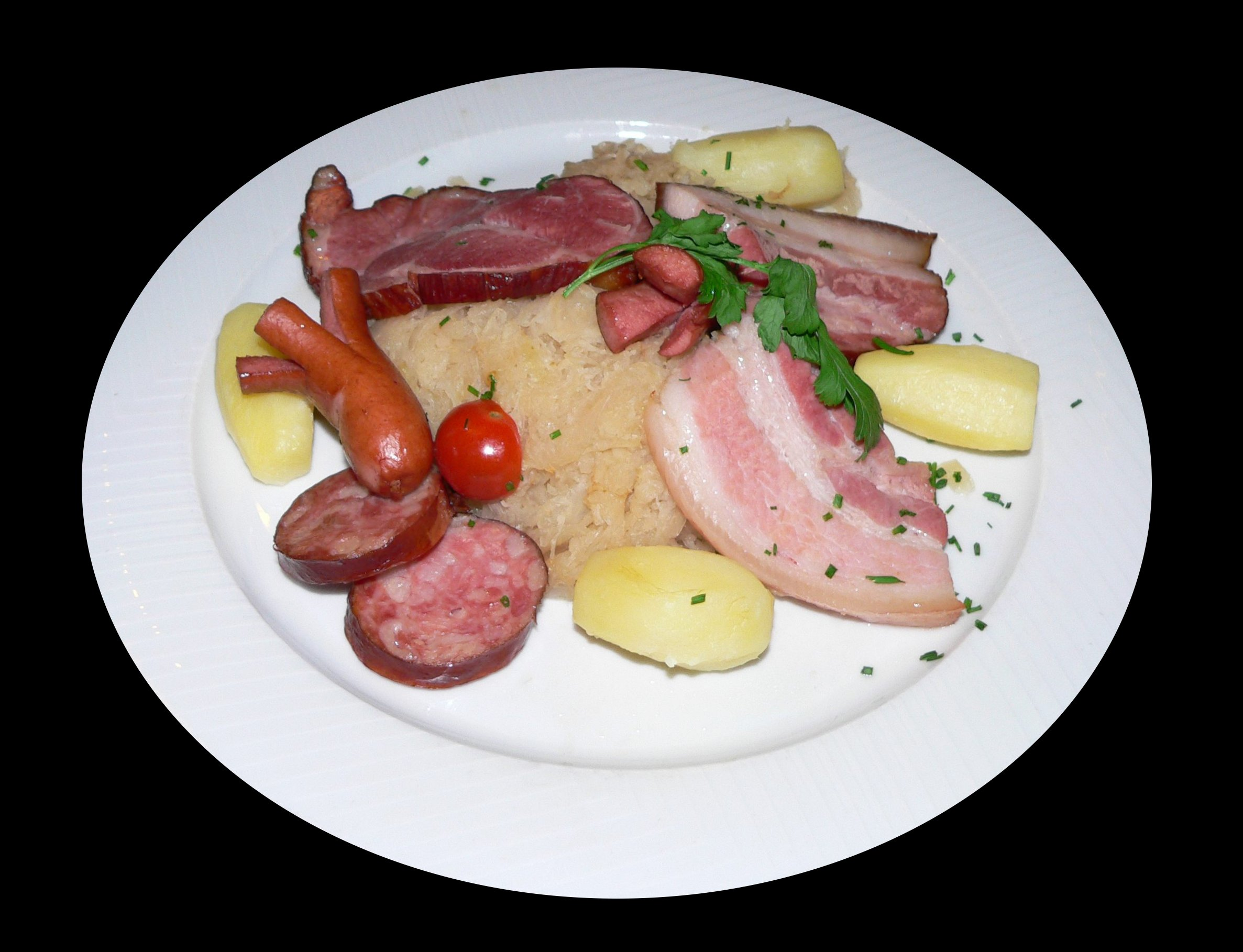 Schlachtplatte